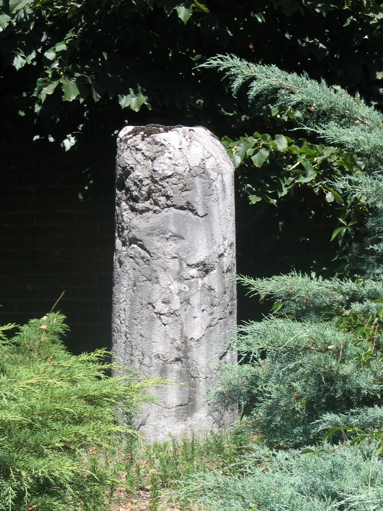 Asti , il Pilone, vecchio cippo per la partenza dal Palio . Foto fatta da me Faberh